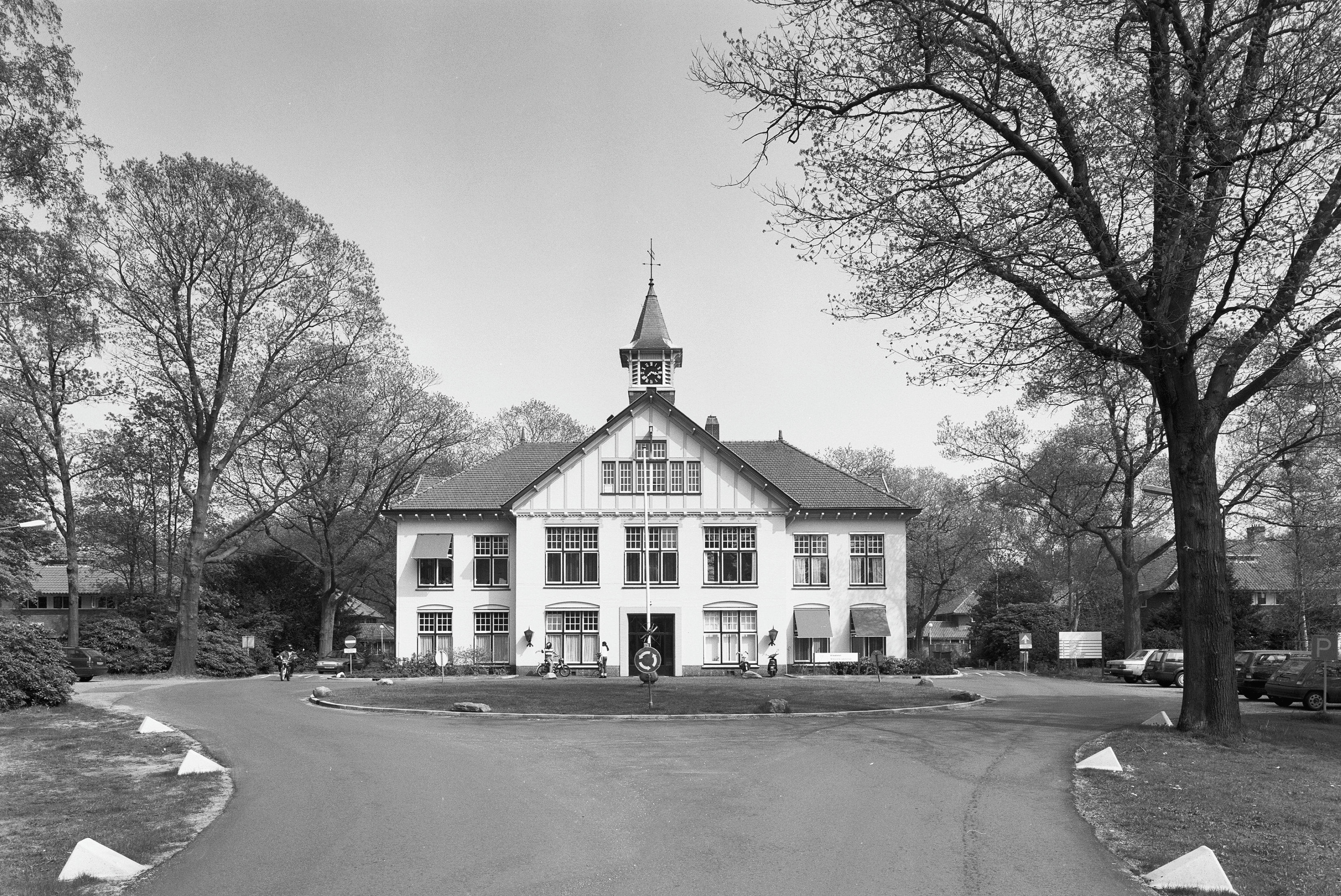 Overzicht hoofdgebouw, door F.W.M. Poggenbeek (opmerking: GB De Utrechtse Heuvelrug)